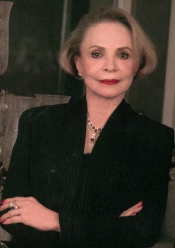 Olga Duque de Ospina. Foto por Dora Franco